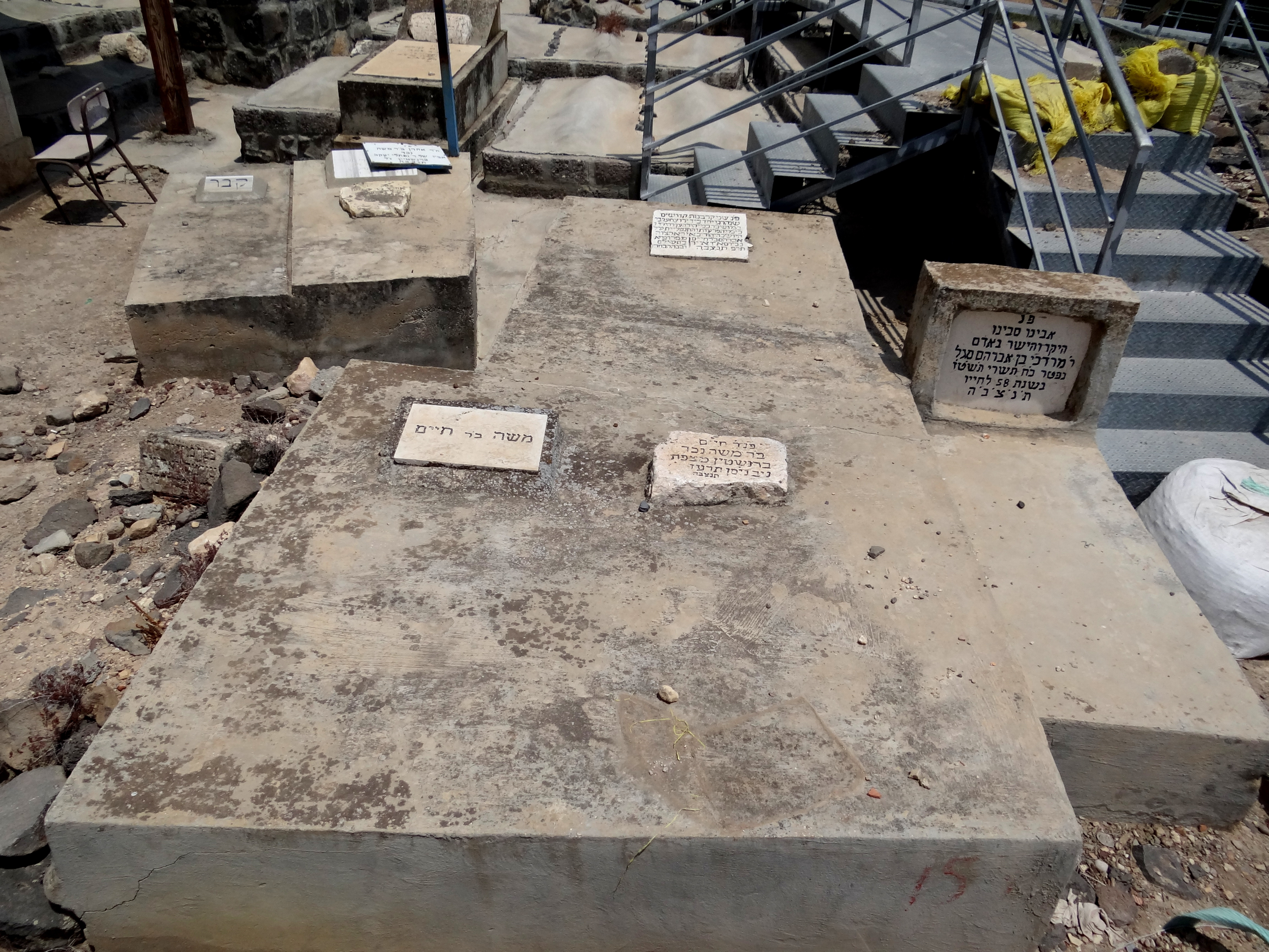 הקברים של בני משפחת ברנשטיין. שהתיישבו בתחילת המאה ה-20 במושבה בני יהודה ברמת הגולן בשנת 1920 רצח שכן ערבי את פרומא אם משפחת ברנשטיין ואת בנה אברהם הקברים נמצאים בבית הקברות הישן של טבריה , קבר מס' 1687 חלקה ב' אזור א